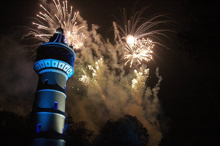 photo du spectacle pyroscénique des 100 ans du Château d'eau de sélestat